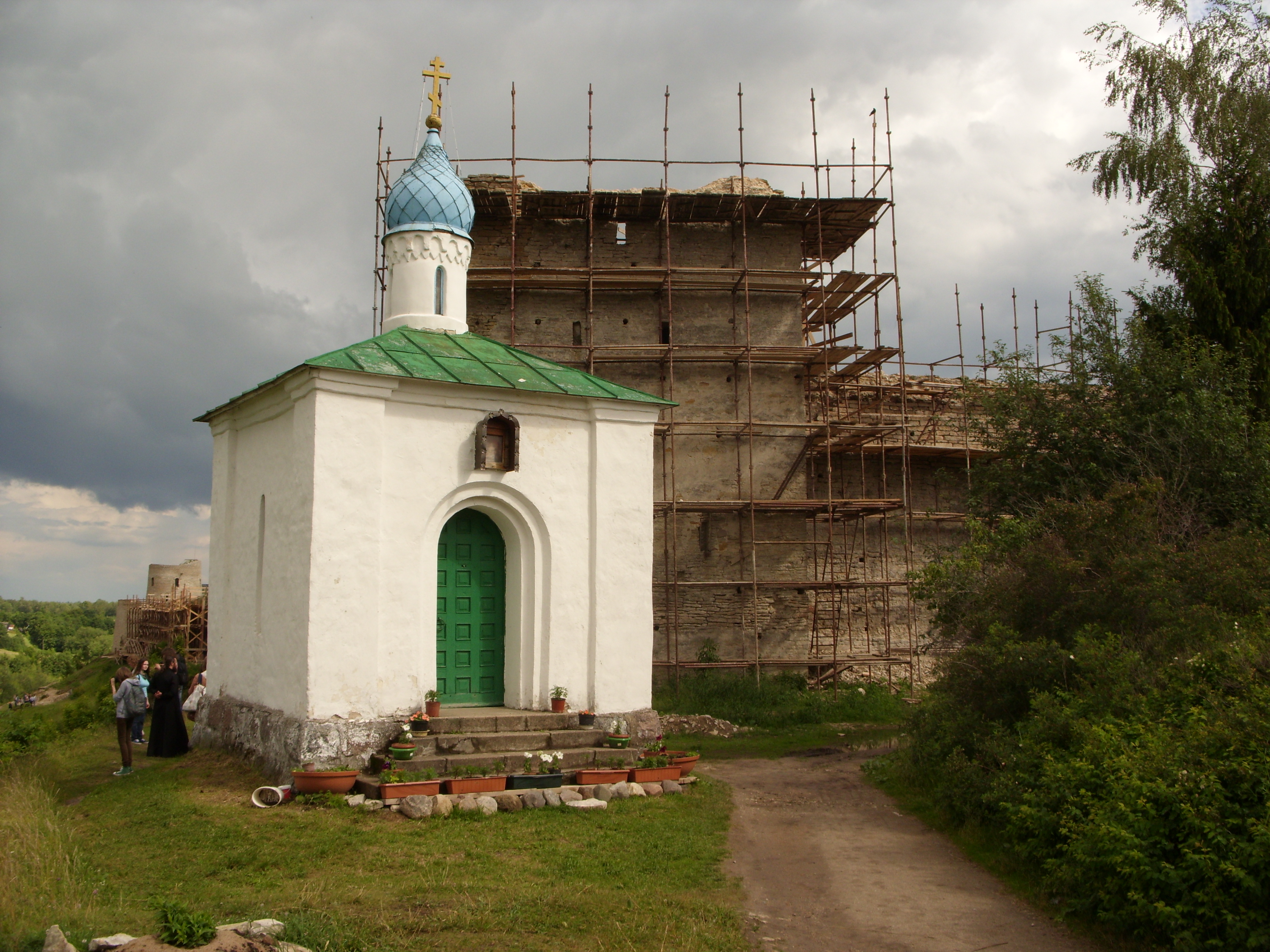 Izborsk. Korsunskaya chasovnya